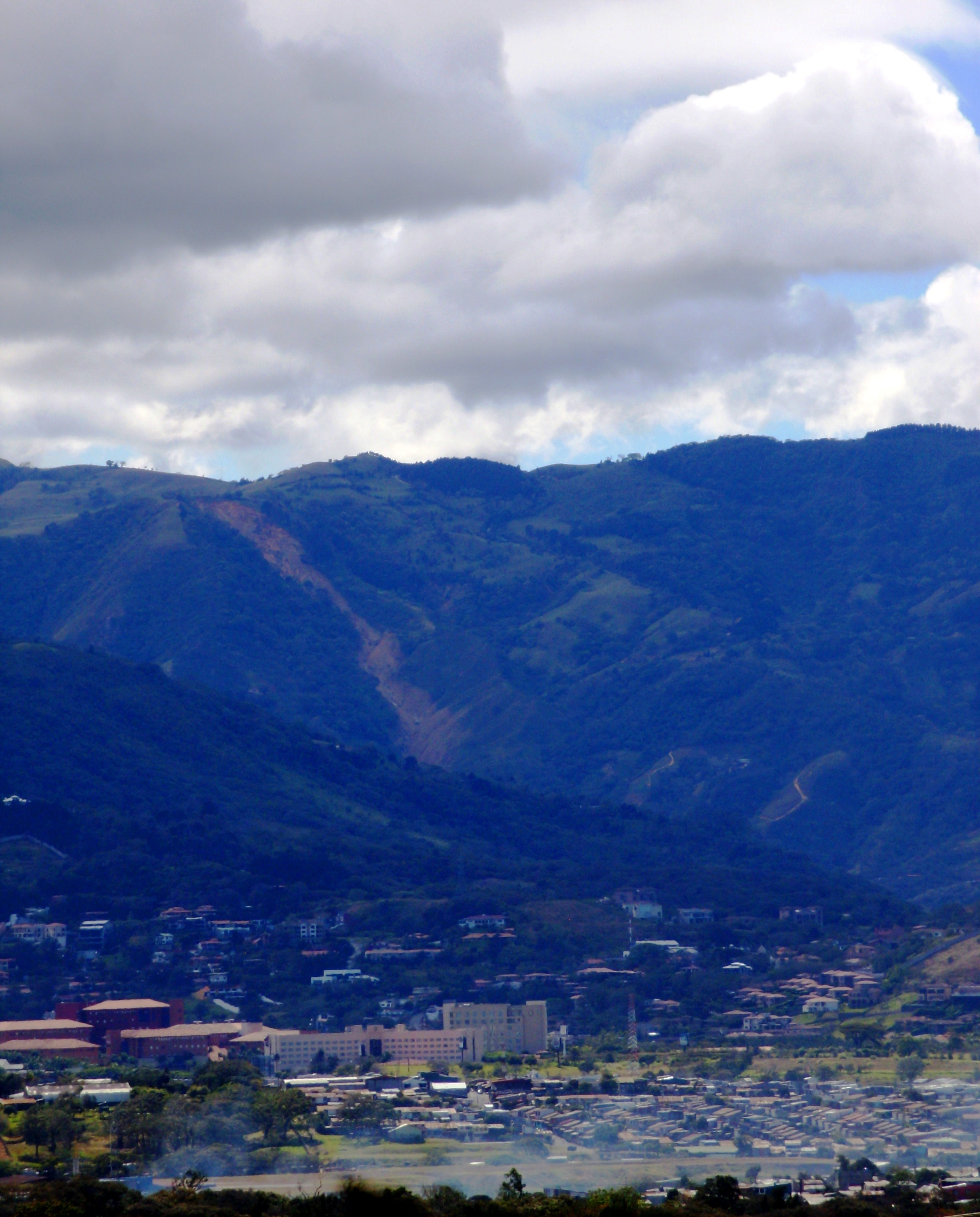 Deslizamiento Cerro Chitaría en Santa Ana, Costa Rica